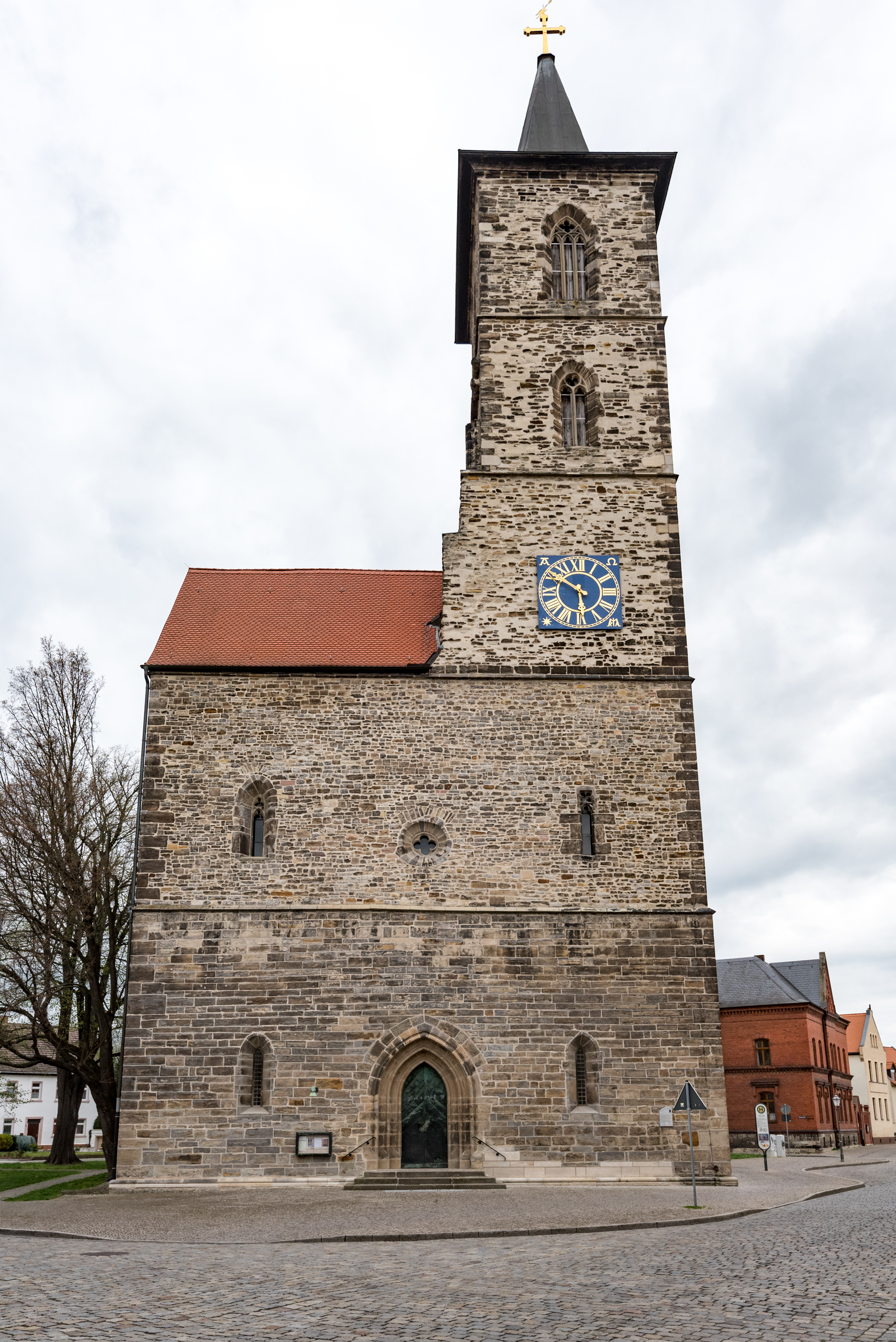 Bernburg (Saale), St. Nikolai